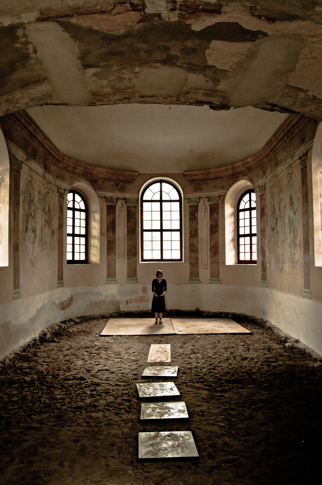 v. Cziráky kastély (Lovasberény, Belmajor) This is a photo of a monument in Hungary, Identifier: 3672